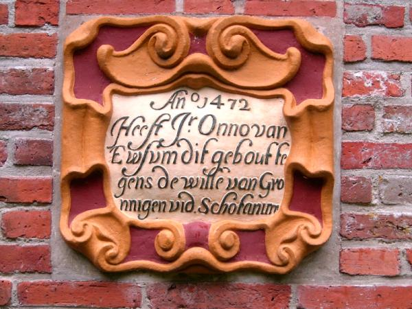 Plakaat op de geschutskoepel van de Borg Ewsum.